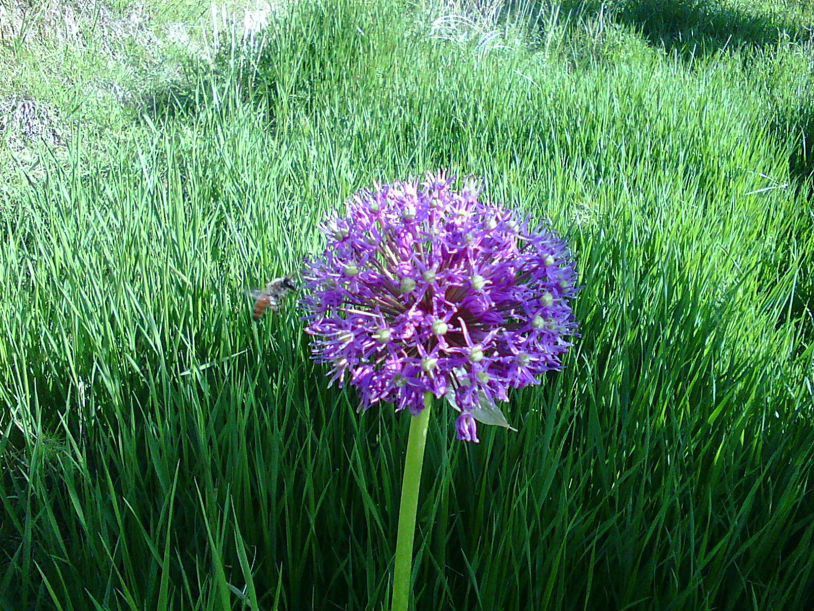 پوشش گیاهی چشمه‌قصابان، بهار